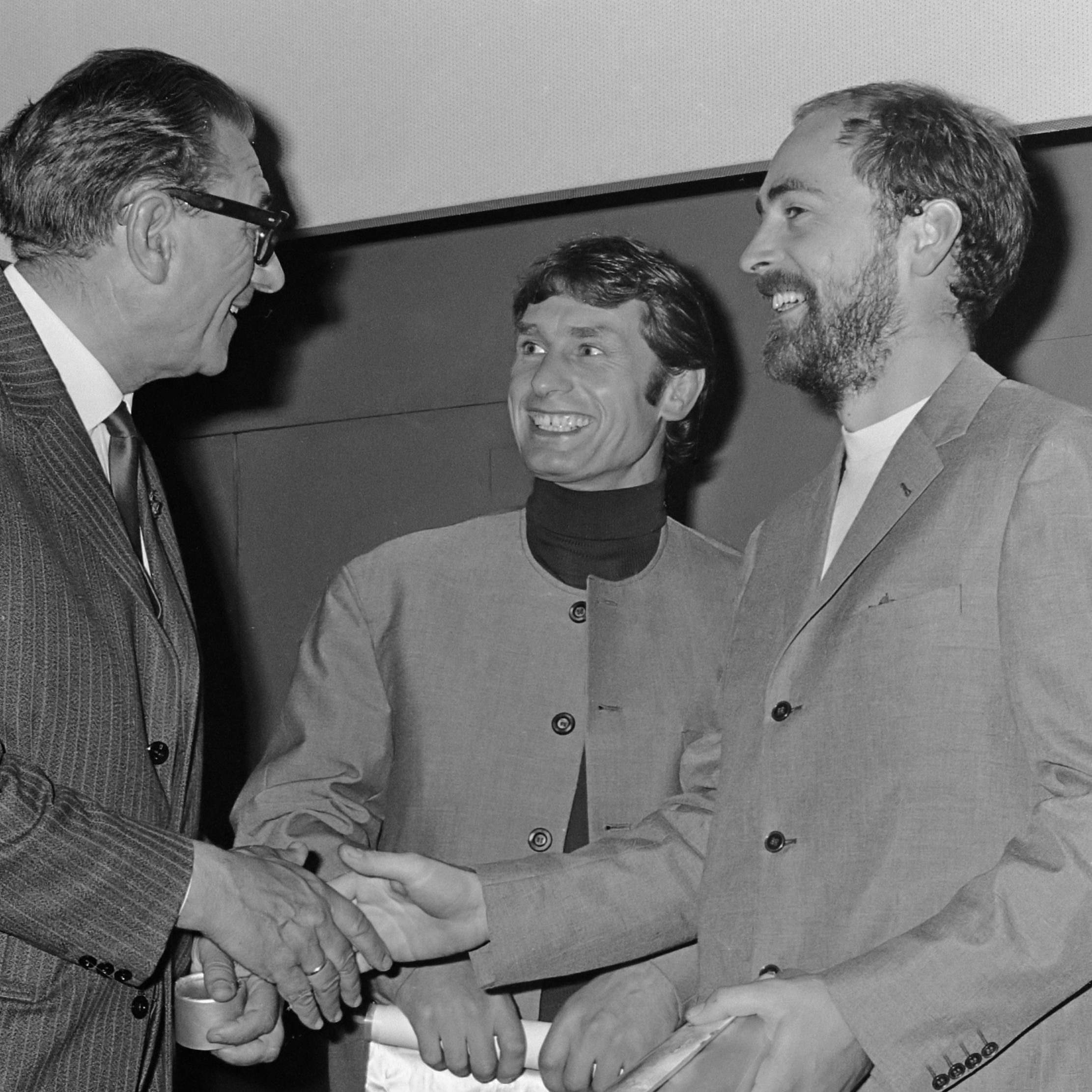 Sikkensprijs 1967 . Professor ir. J. N. van den Broek reikt prijs uit aan midden Maurice Agis en rechts Peter Jones 22 september 1967